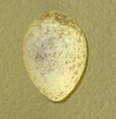 Pica pica egg